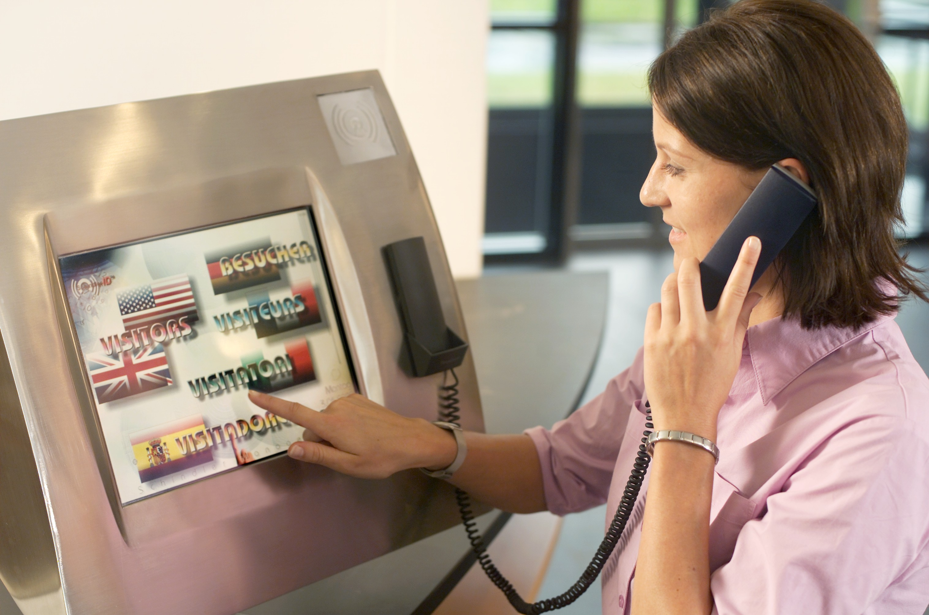 VisitorControl